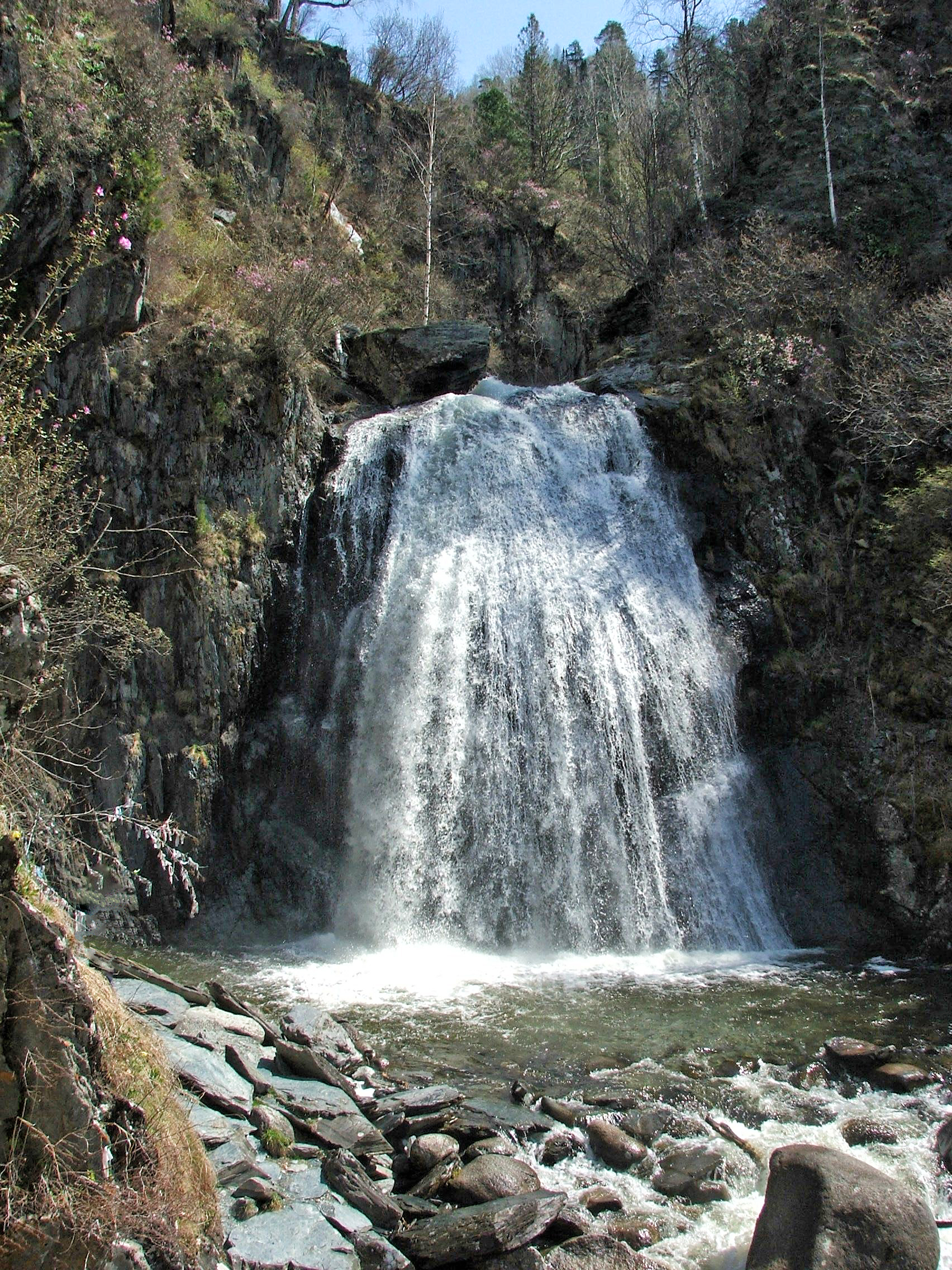 Водопад Корбу: Телецкое озеро, в приустьевой части р. Бол. Корбу.,Яйлю,Турочакский район, Алтай This image is related to the protected area of Russia number 0410029